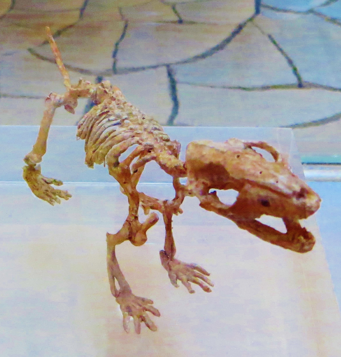 Fossil of Zhangheotherium, an extinct mammal- Took the picture at Muse (Trento)